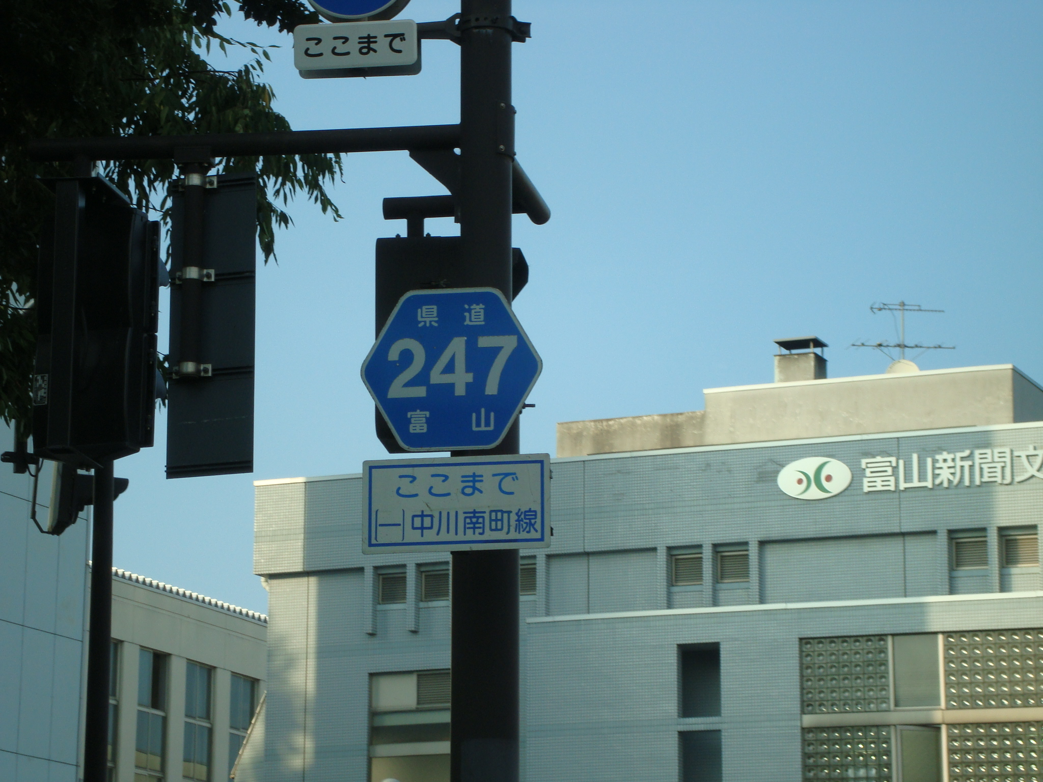 富山県道247号中川南町線 富山県高岡市中川付近